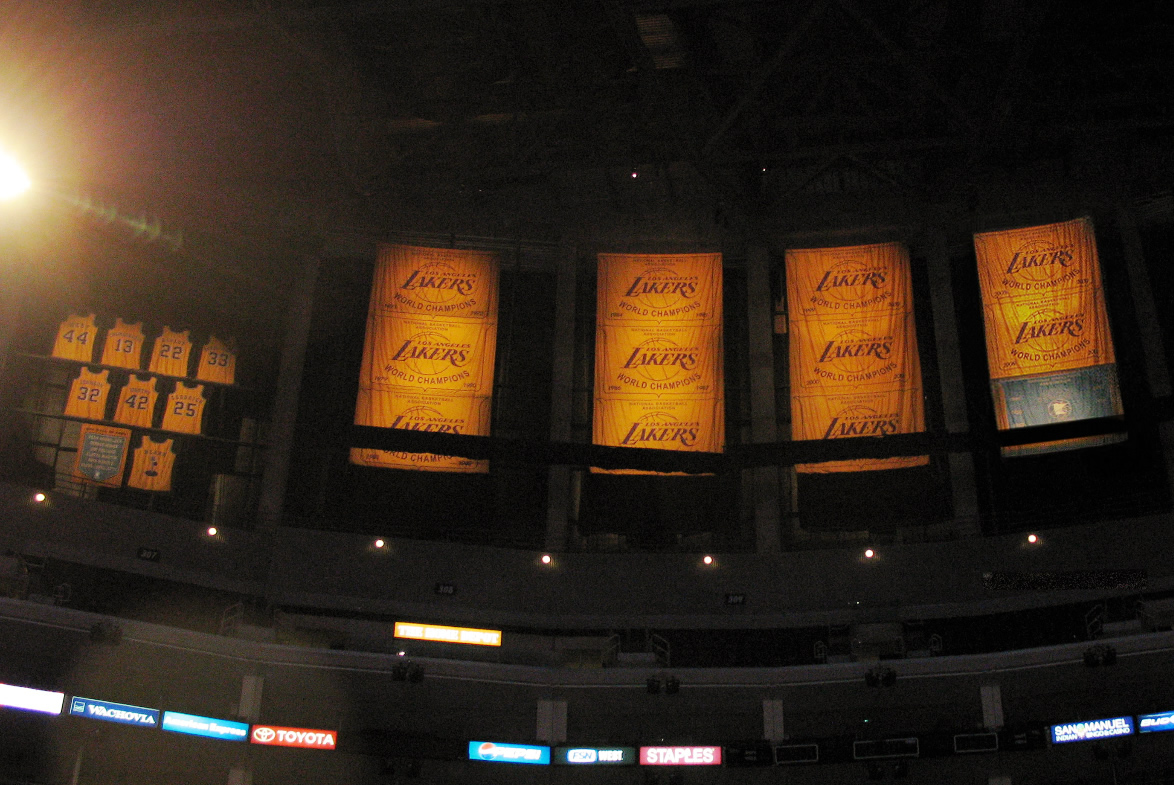 lens flare